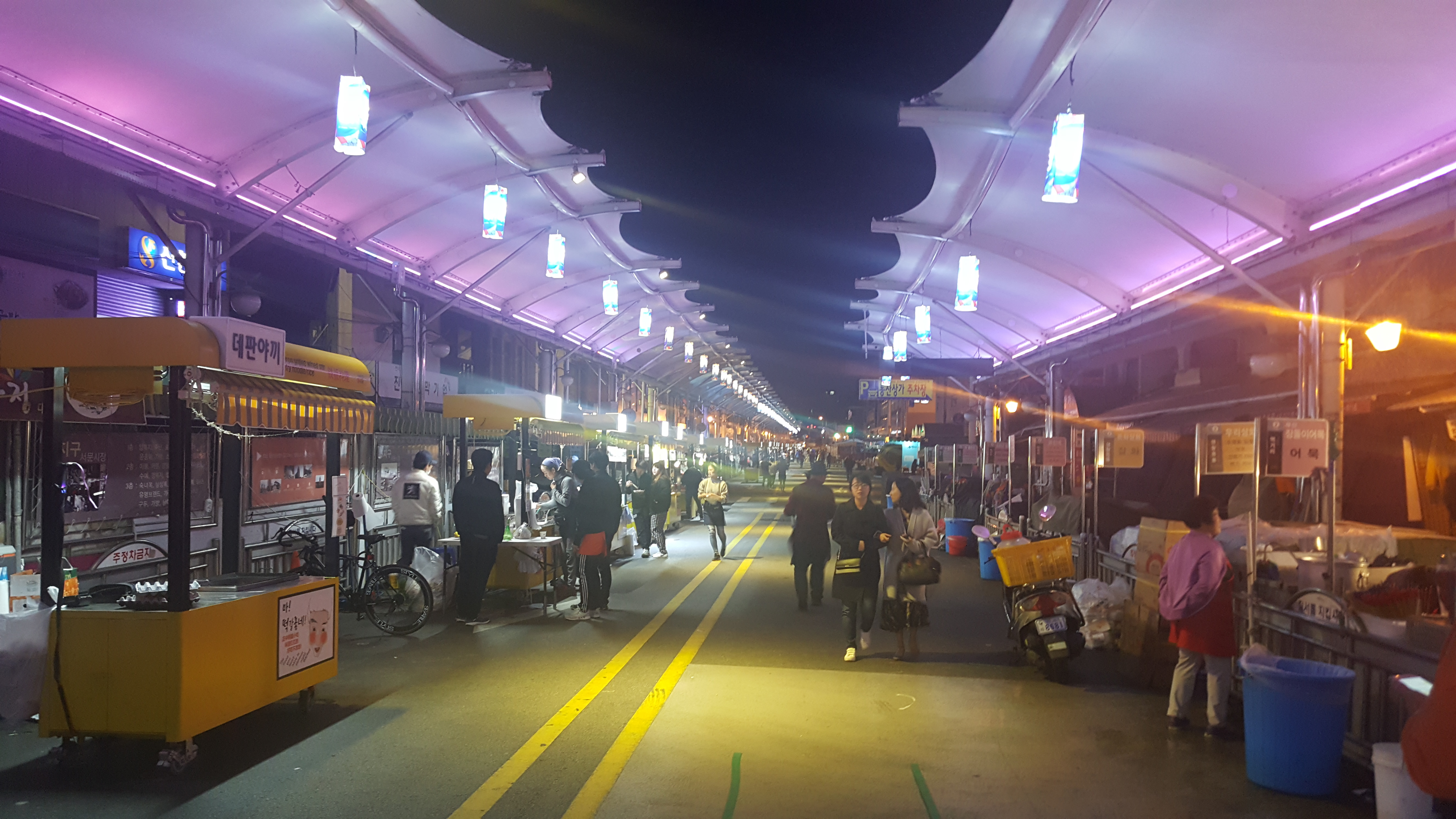 2016년 10월 서문시장 야시장